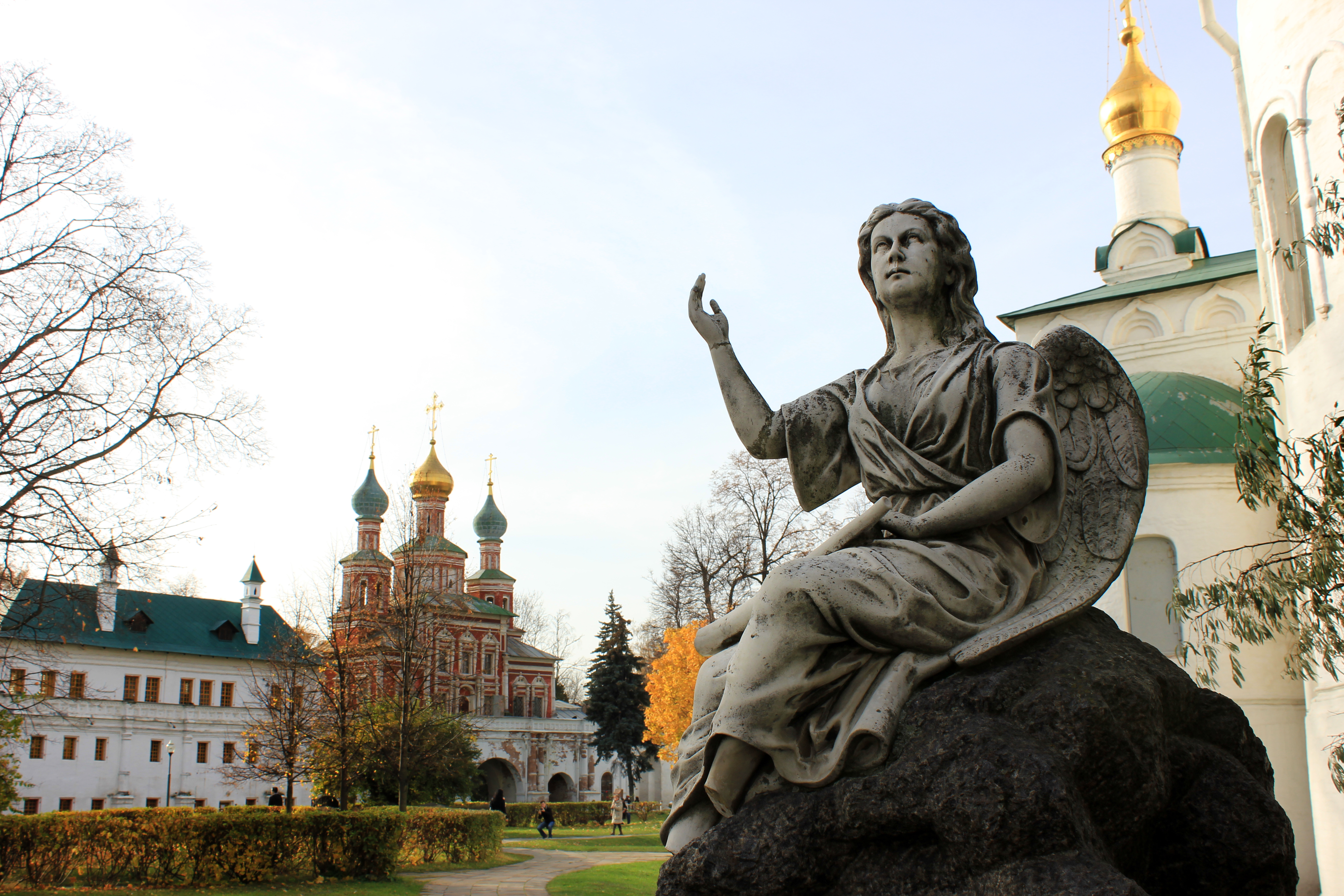 Новодевичий монастырь кладбище: Новодевичий проезд, Хамовники, Центральный округ, Москва